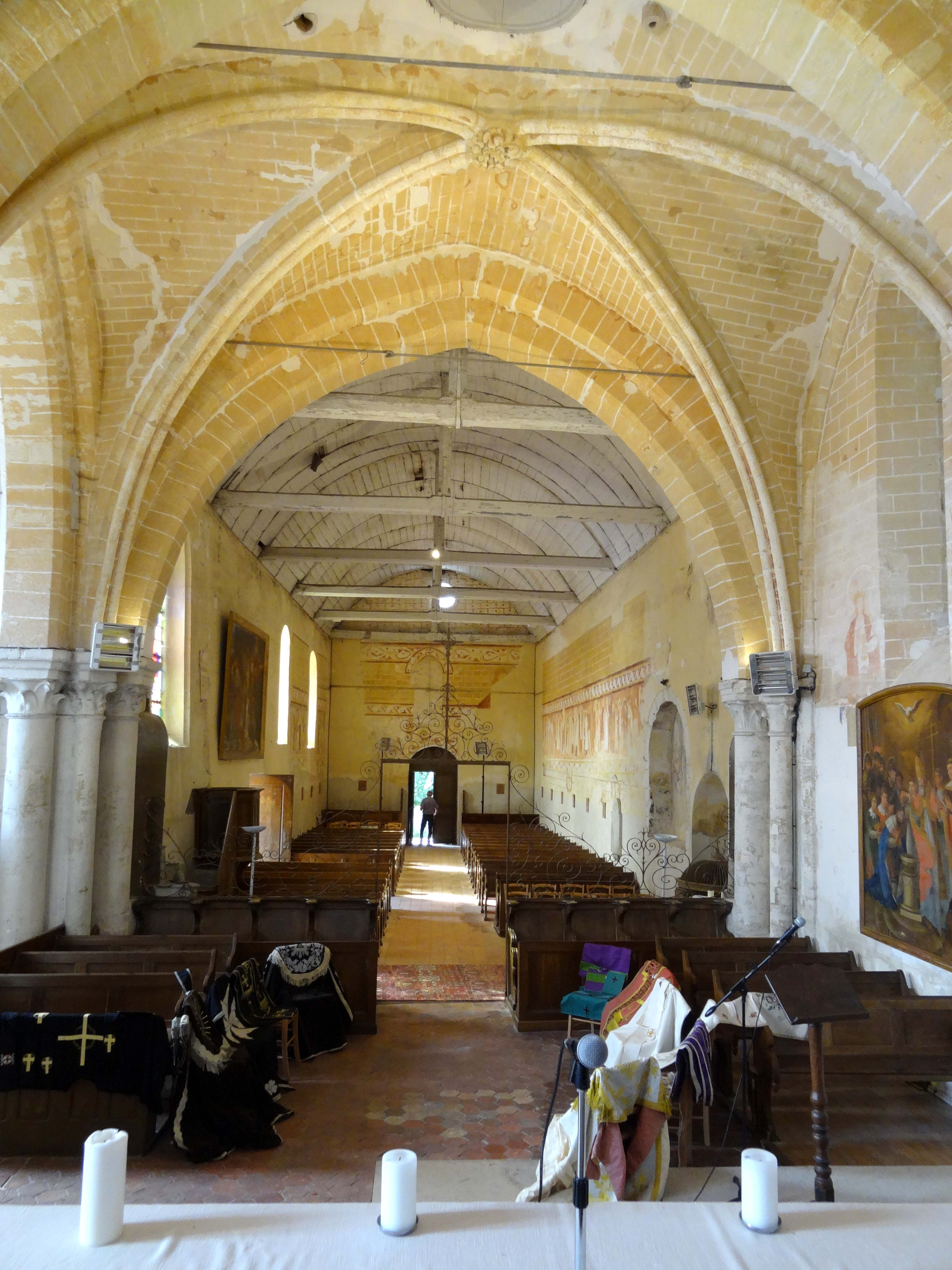 Intérieur de l'église - voir titre.